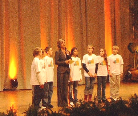 Verleihung des Jugendliteraturpreises während der Frankfurter Buchmesse – Oktober 2005